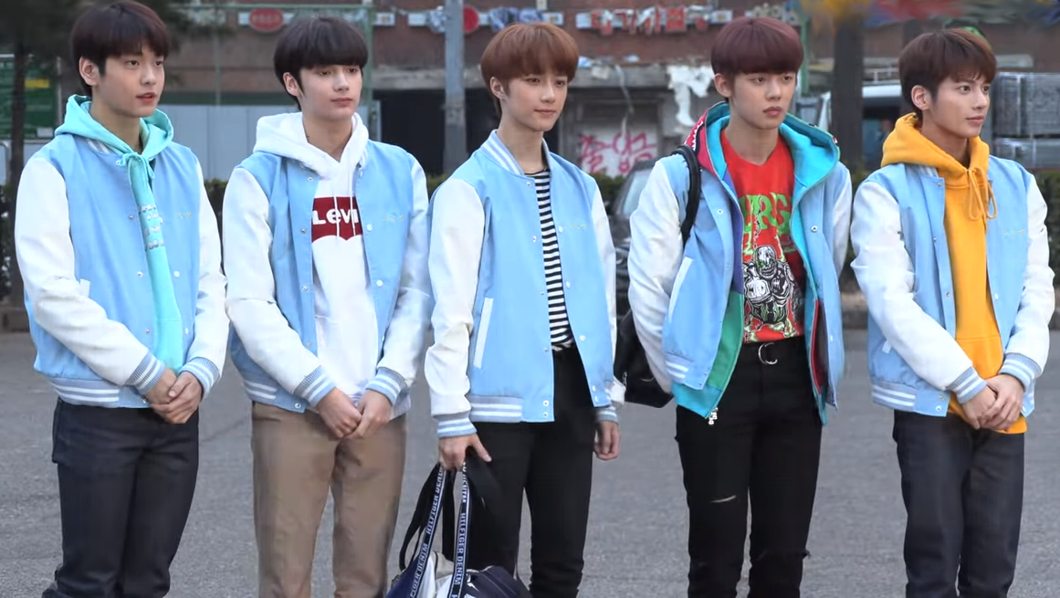 투모로우바이투게더 (TOMORROW X TOGETHER) TXT @ 190315 뮤직뱅크 출근길